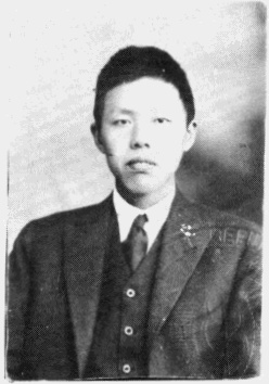 中文（台灣）: 吳有訓院士